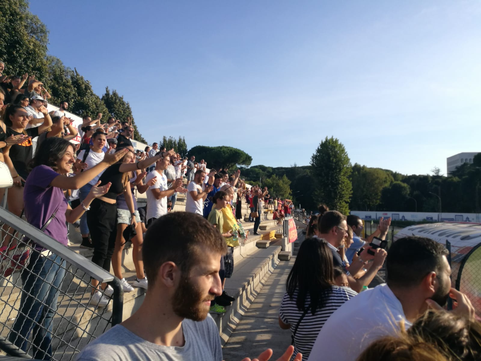 Tifosi al Tre Fontane partita Roma femminile